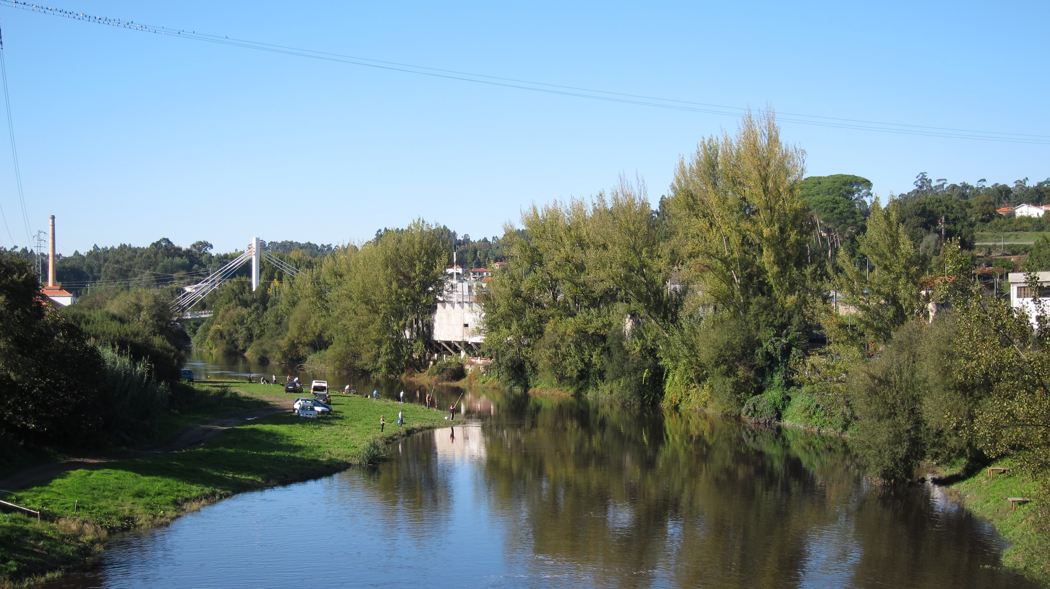 Santo Tirso